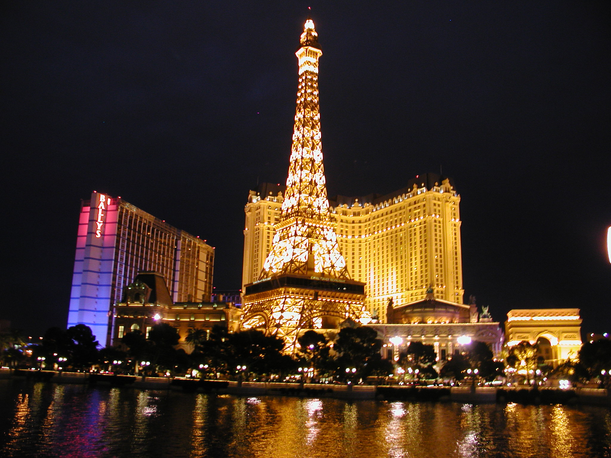 Foto tirada por mim (Vicente Sloboda) no começo de 2004. Na cidade de Las Vegas na Las Vegas Boulevard, mais conhecida como "STRIP". Nesta avenida ficam localizados os maiores cassinos da cidade.